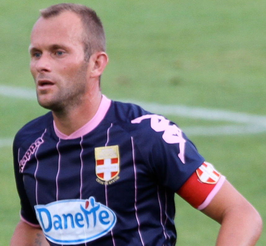 Olivier Sorlin